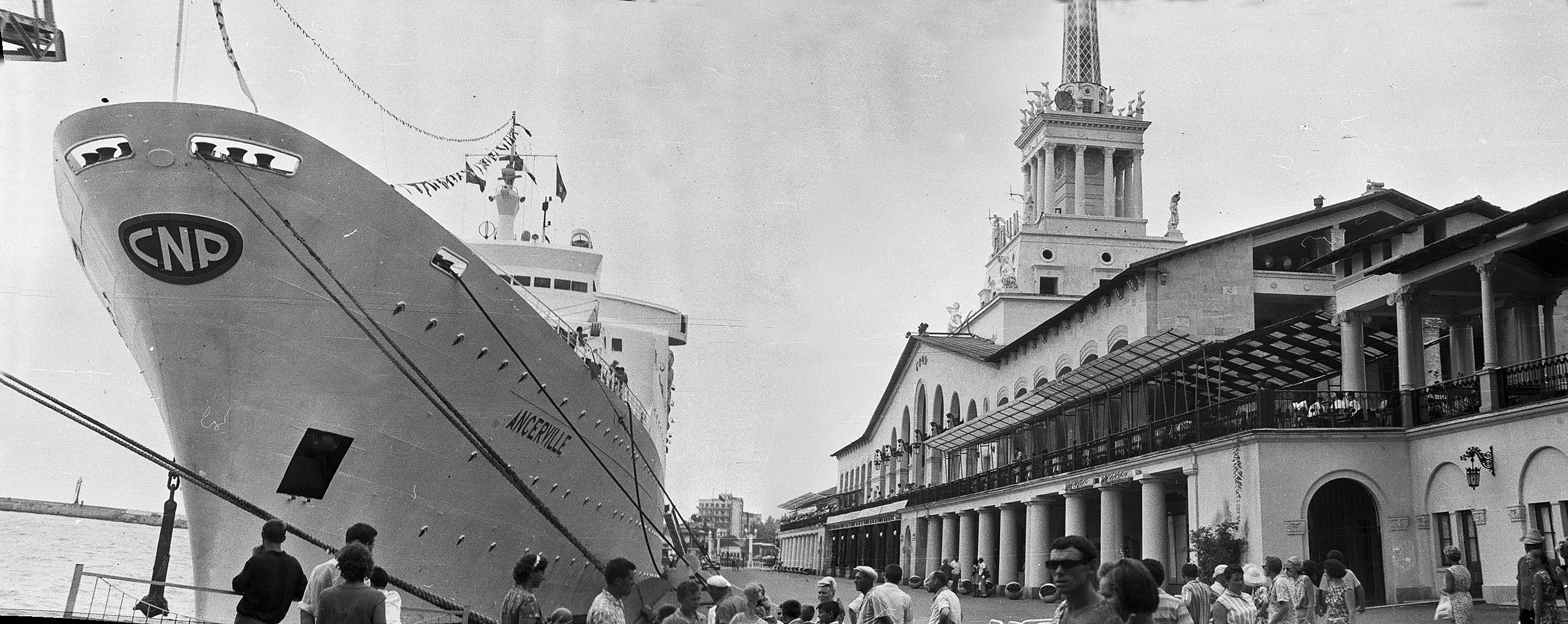 Французское судно Ancerville в порту Сочи, 1967 год.